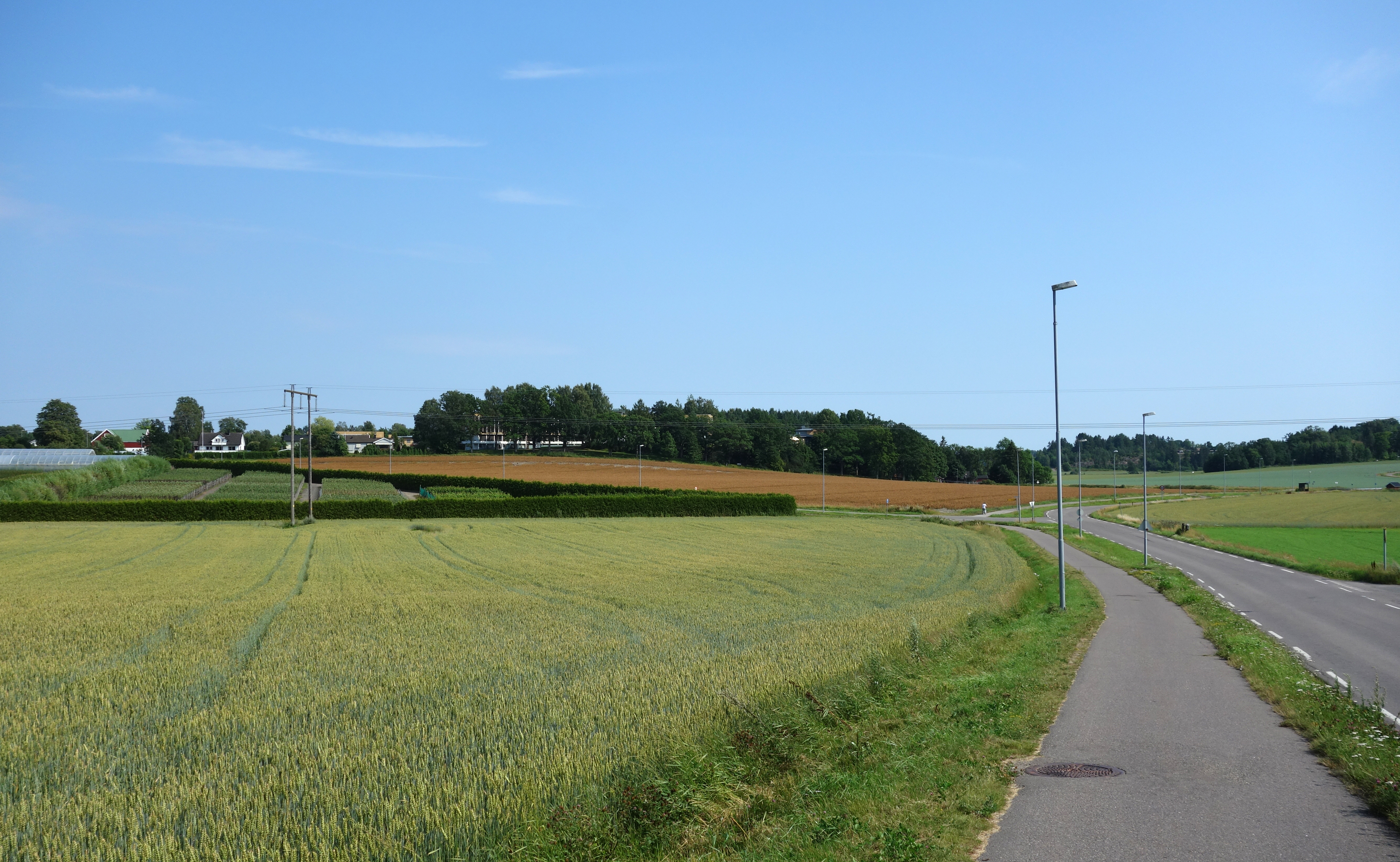 Gipø på Nøtterøy i Vestfold